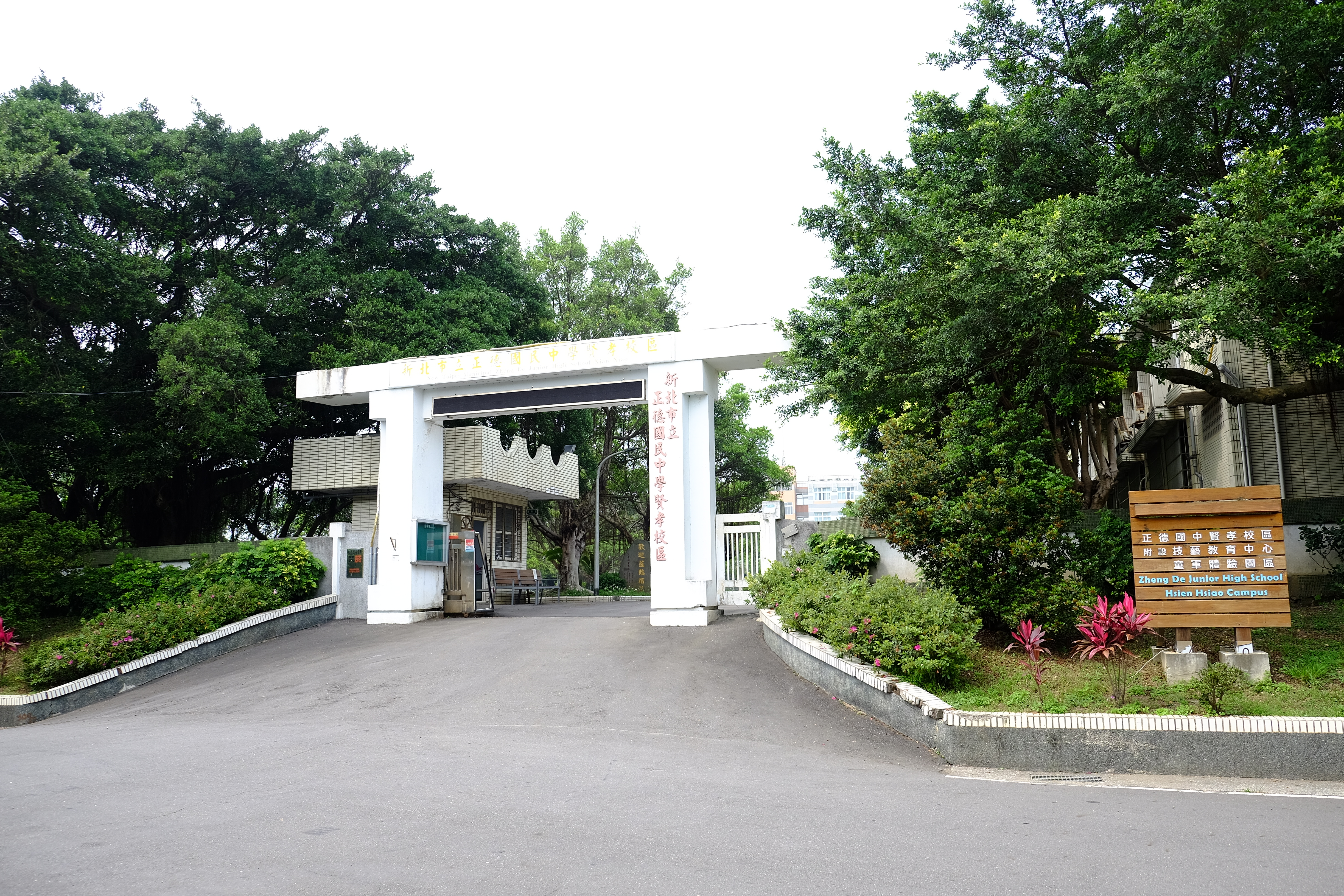 ZhengDe Junior High School XianXiao Campus Gate 2018 淡水區正德國中賢孝校區